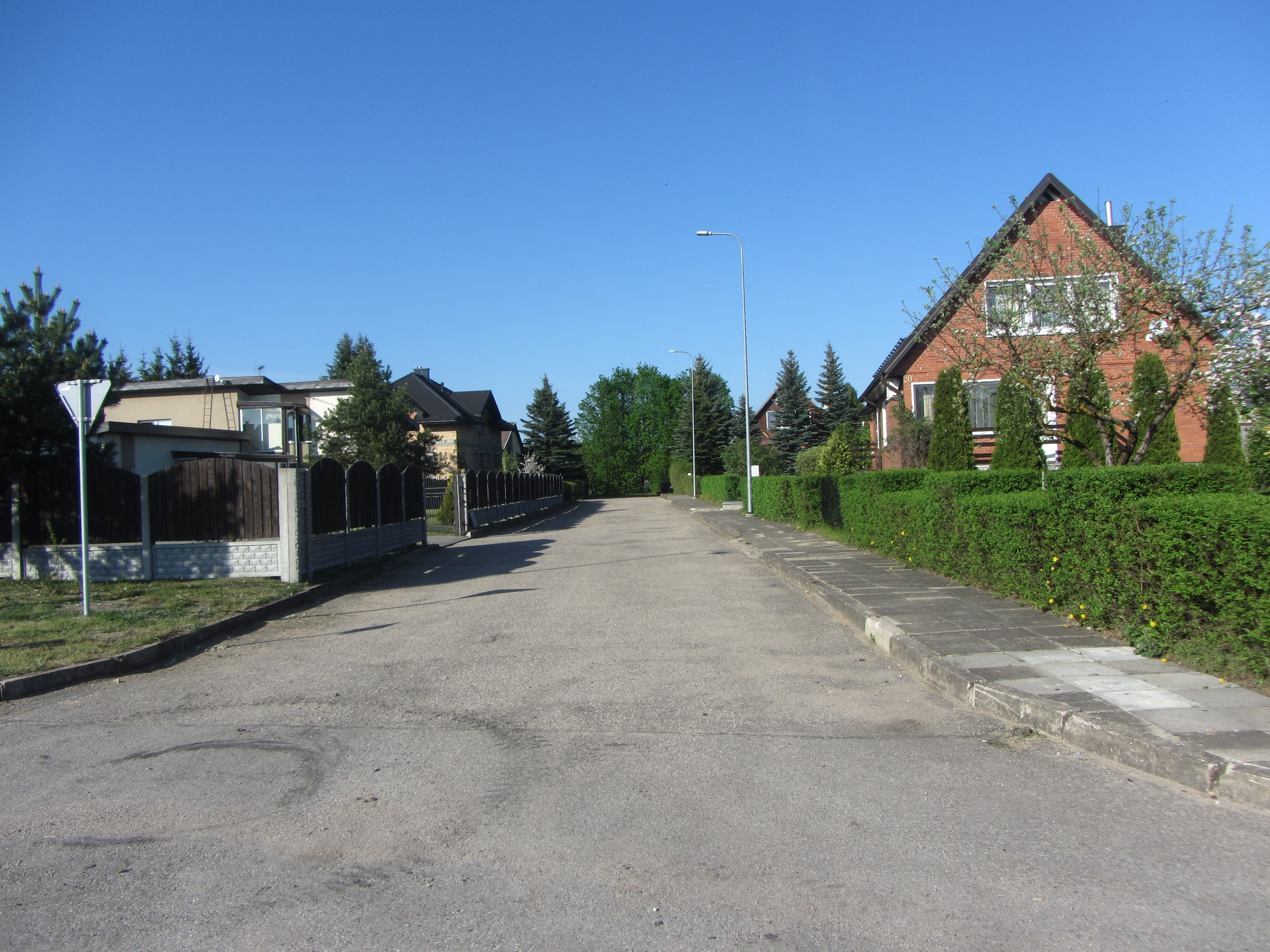 Kanapelka 33134, Lithuania